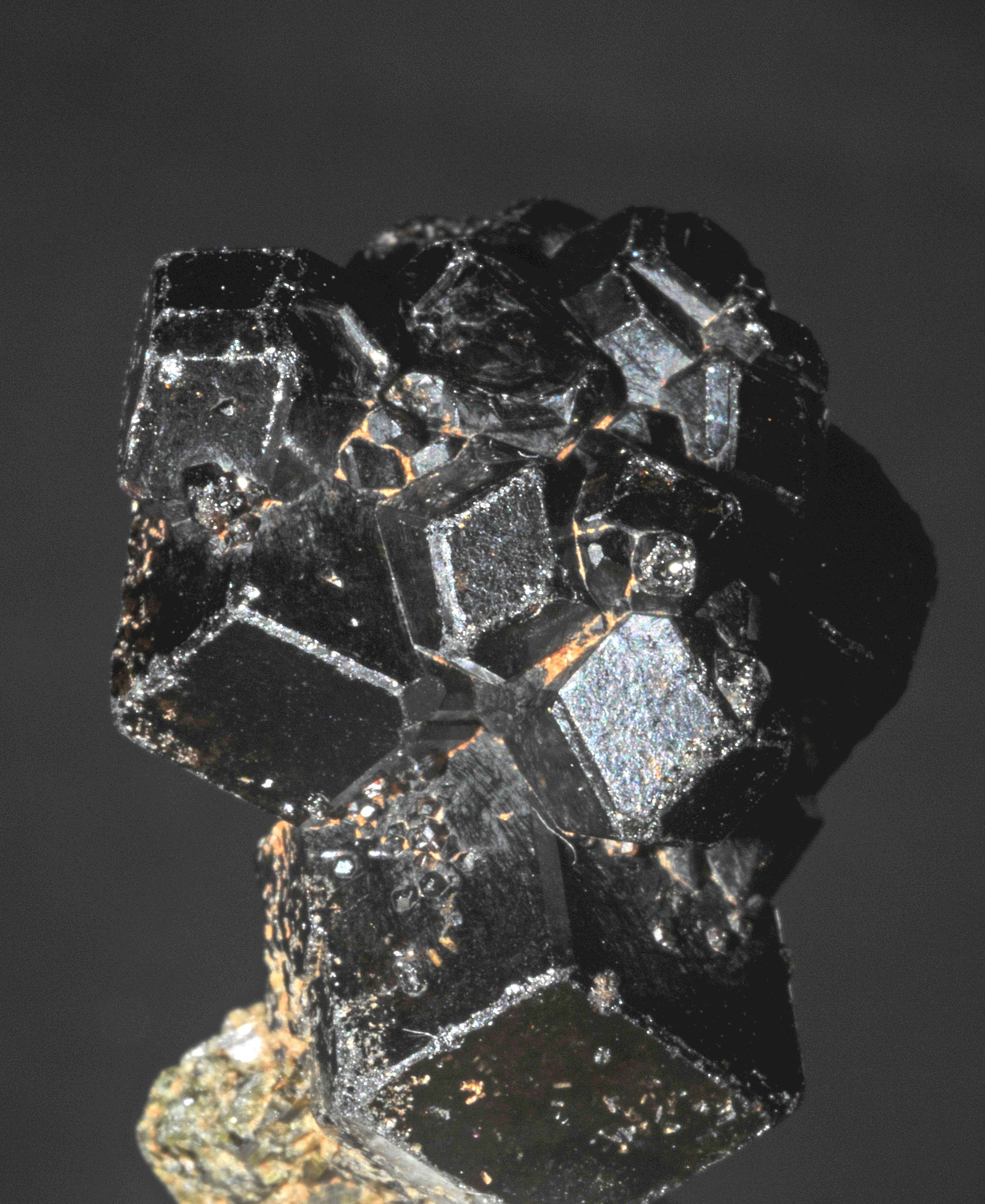 cristaux de grenat var. andradite - mélanite - sur gangue